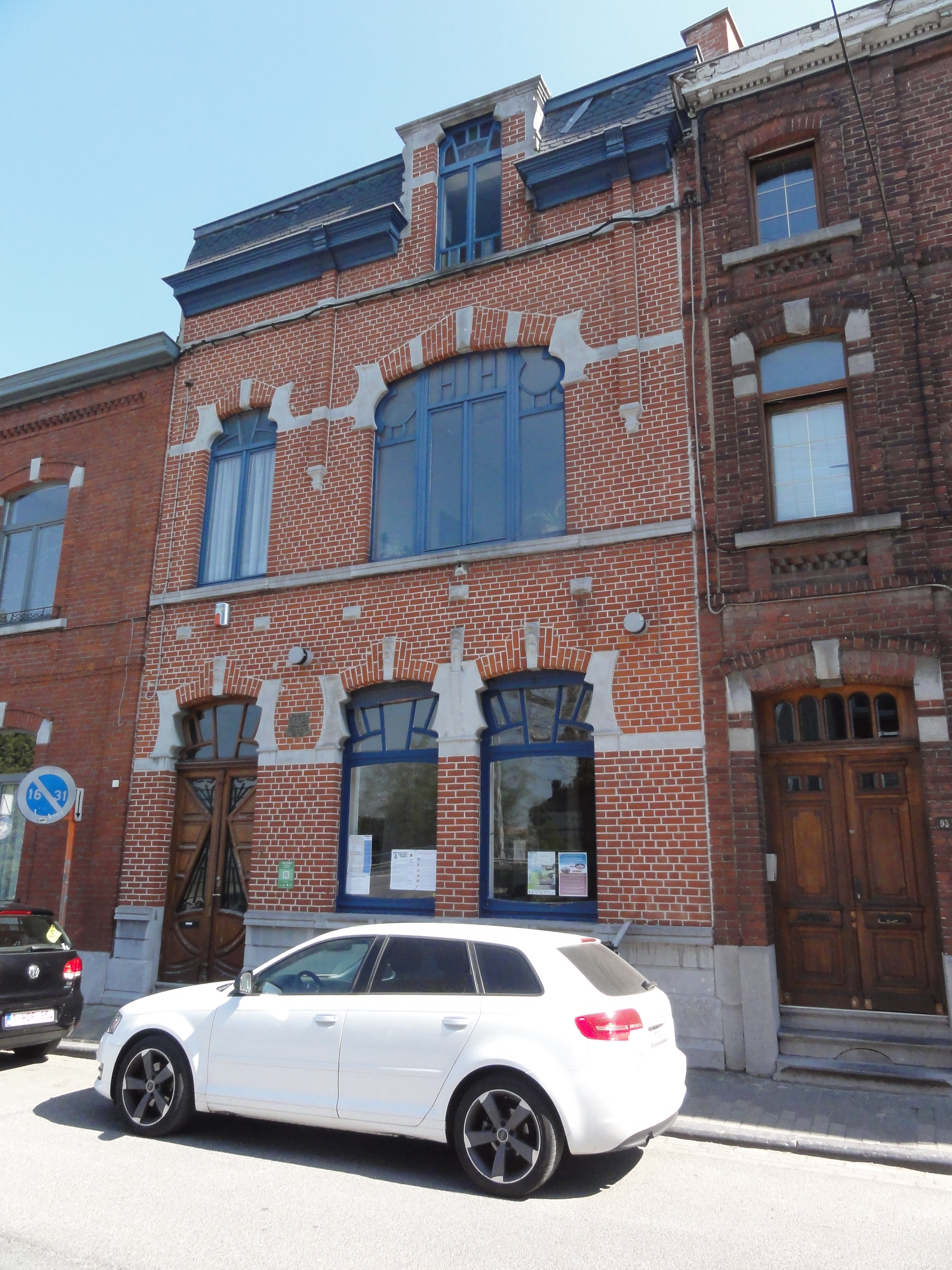 Châtelet (Hainaut) Maison Magritte